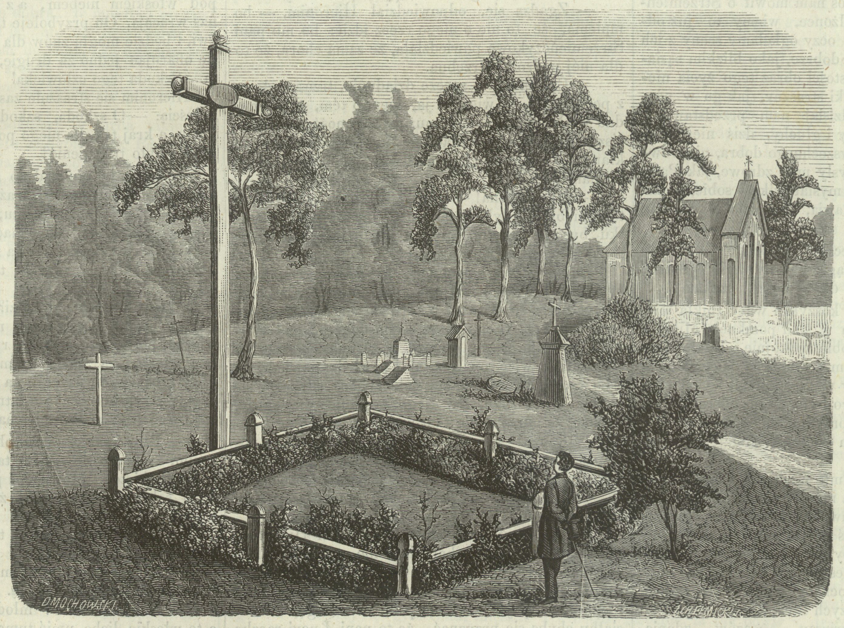 Беларуская (тарашкевіца): Вільня (Vilnia), могілкі Росы (Rosy). Надмагільле Уладзіслава Сыракомлі (Uładzisłaŭ Syrakomla)